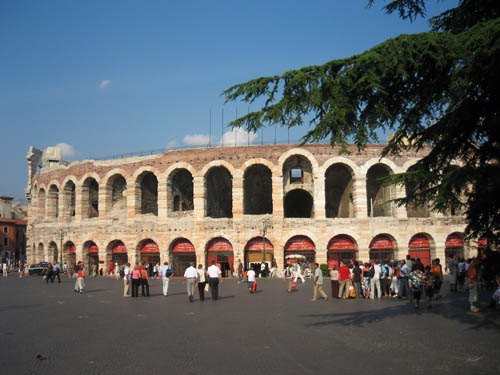 Амфитеатр Арена ди Верона